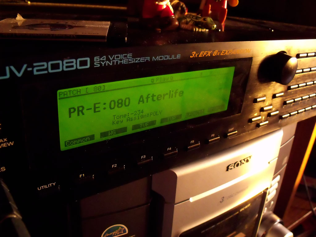 Nuevo juguete! Roland JV-2080